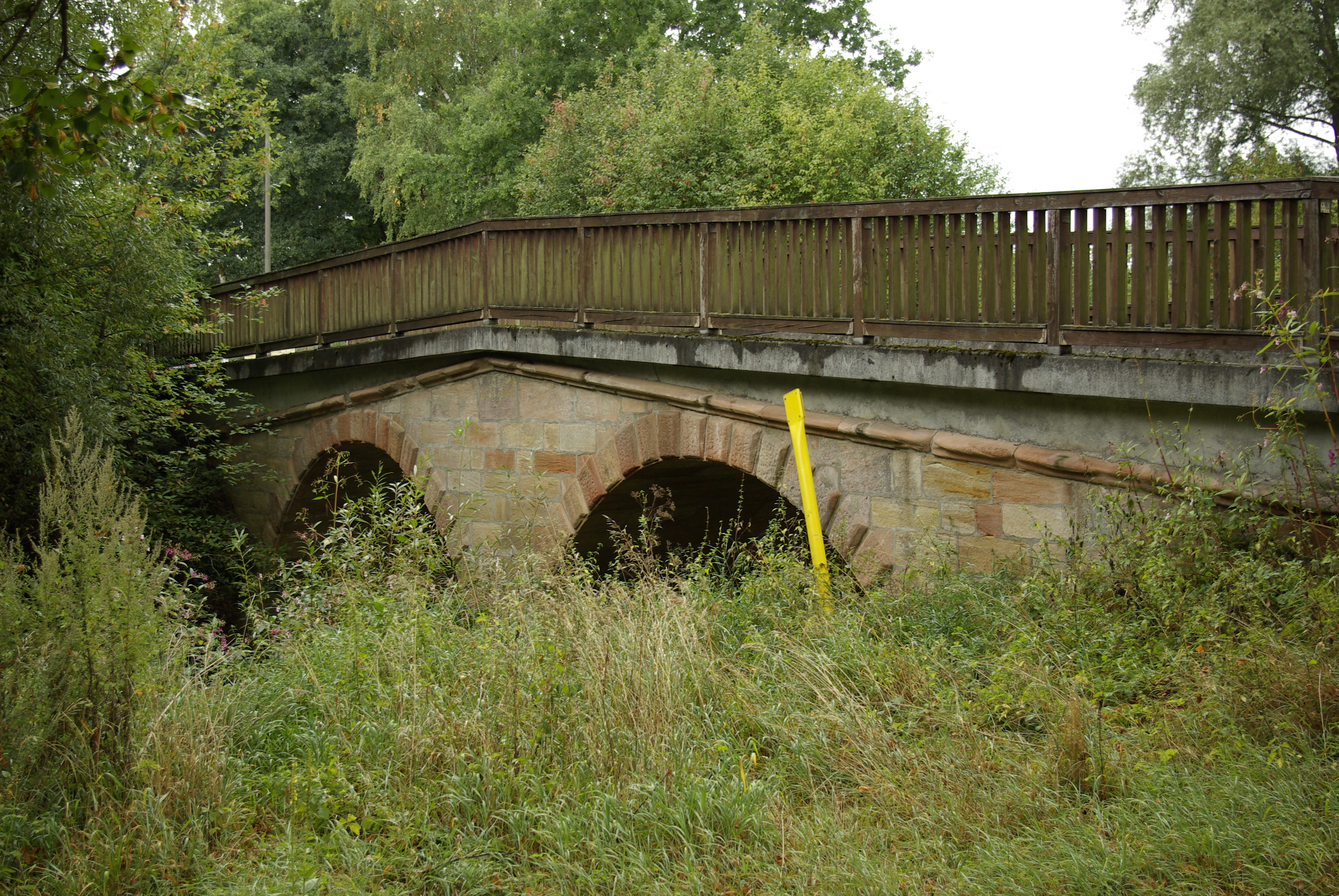 Die Schwabachbrücke zwischen Uttenreuth und dem Eggenhof.